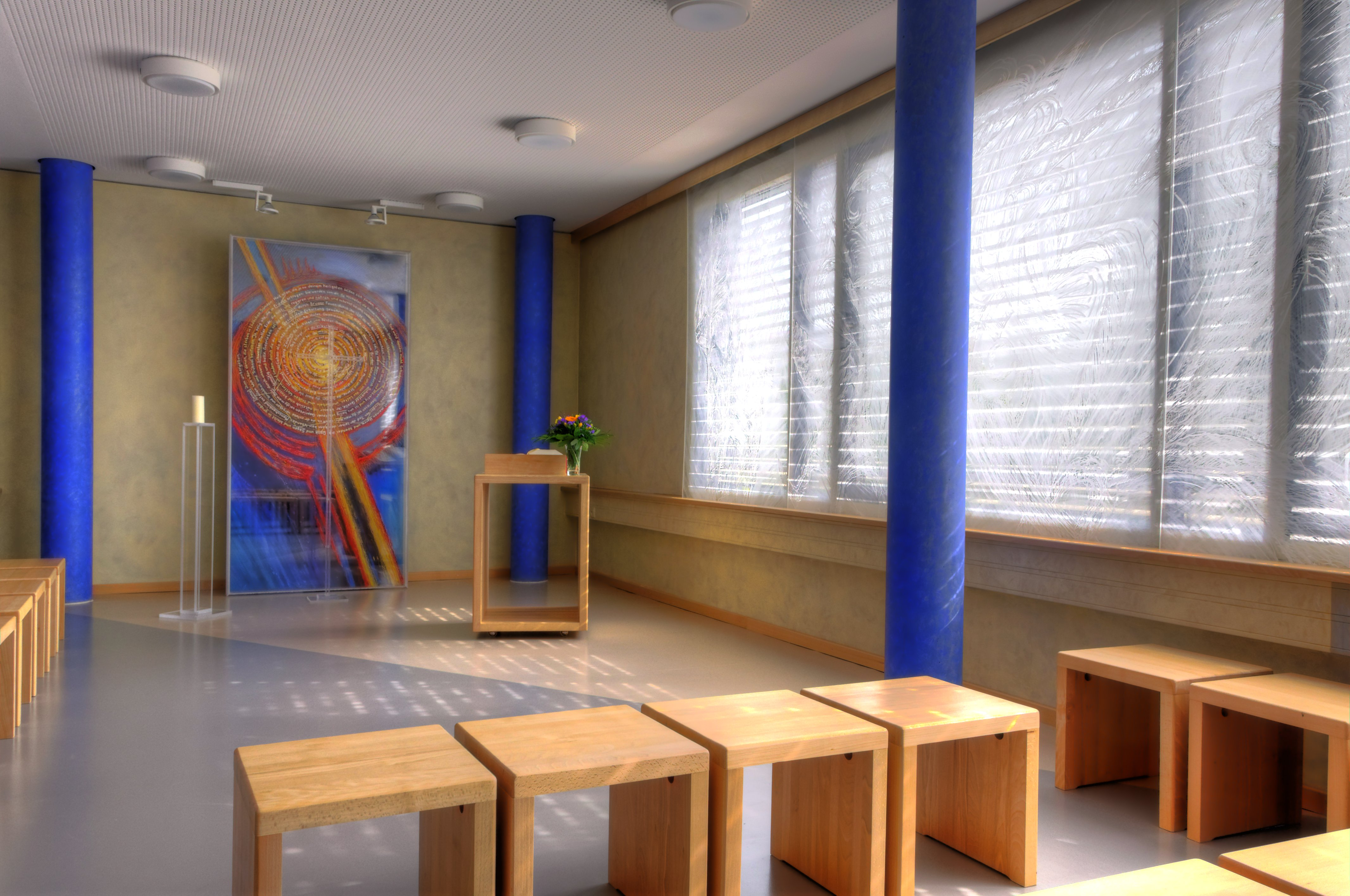 Raum der Stille im Landtag Thüringen